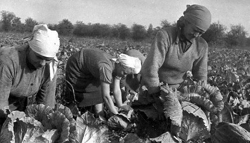 Уборка капусты в колхозе Аргун